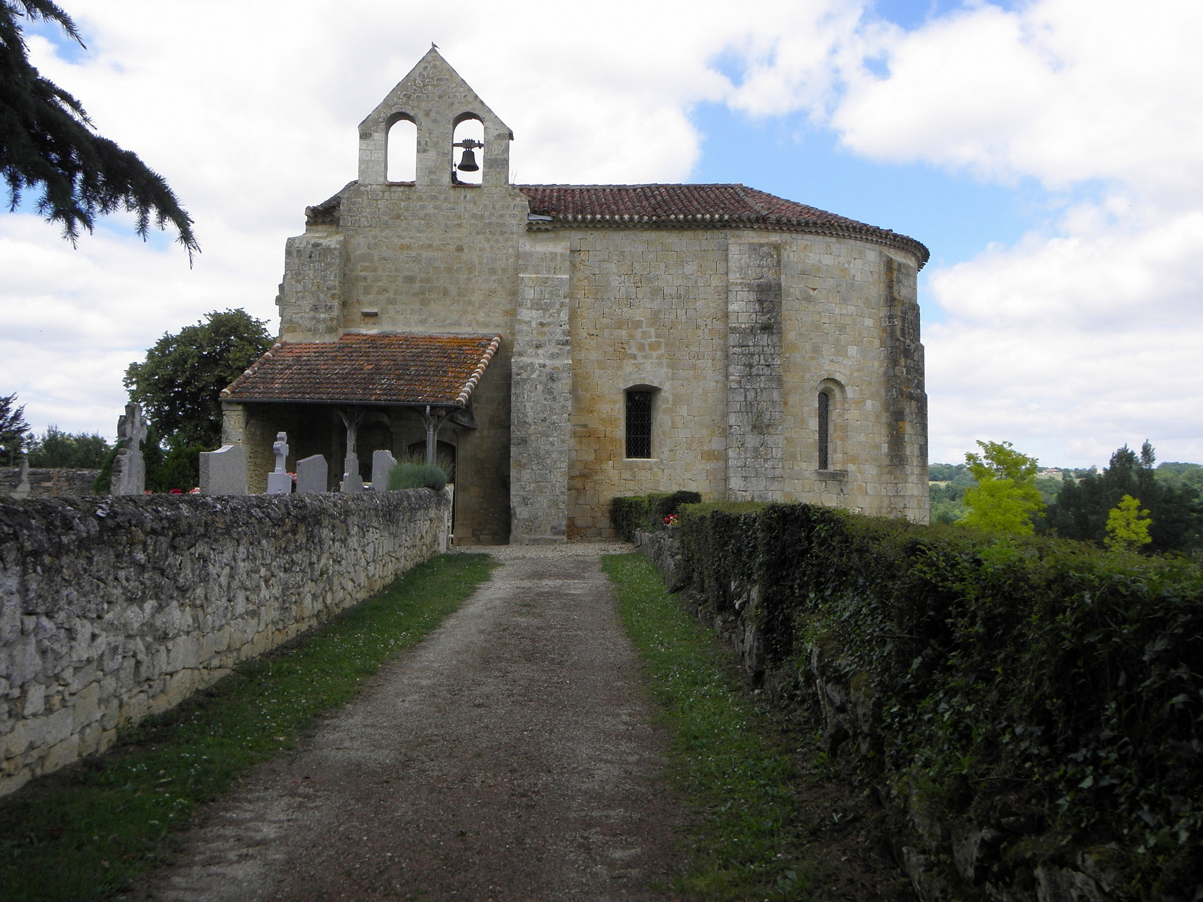 Église Notre-Dame de Vopillon, commun de Beaumont (32). Flanc sud.